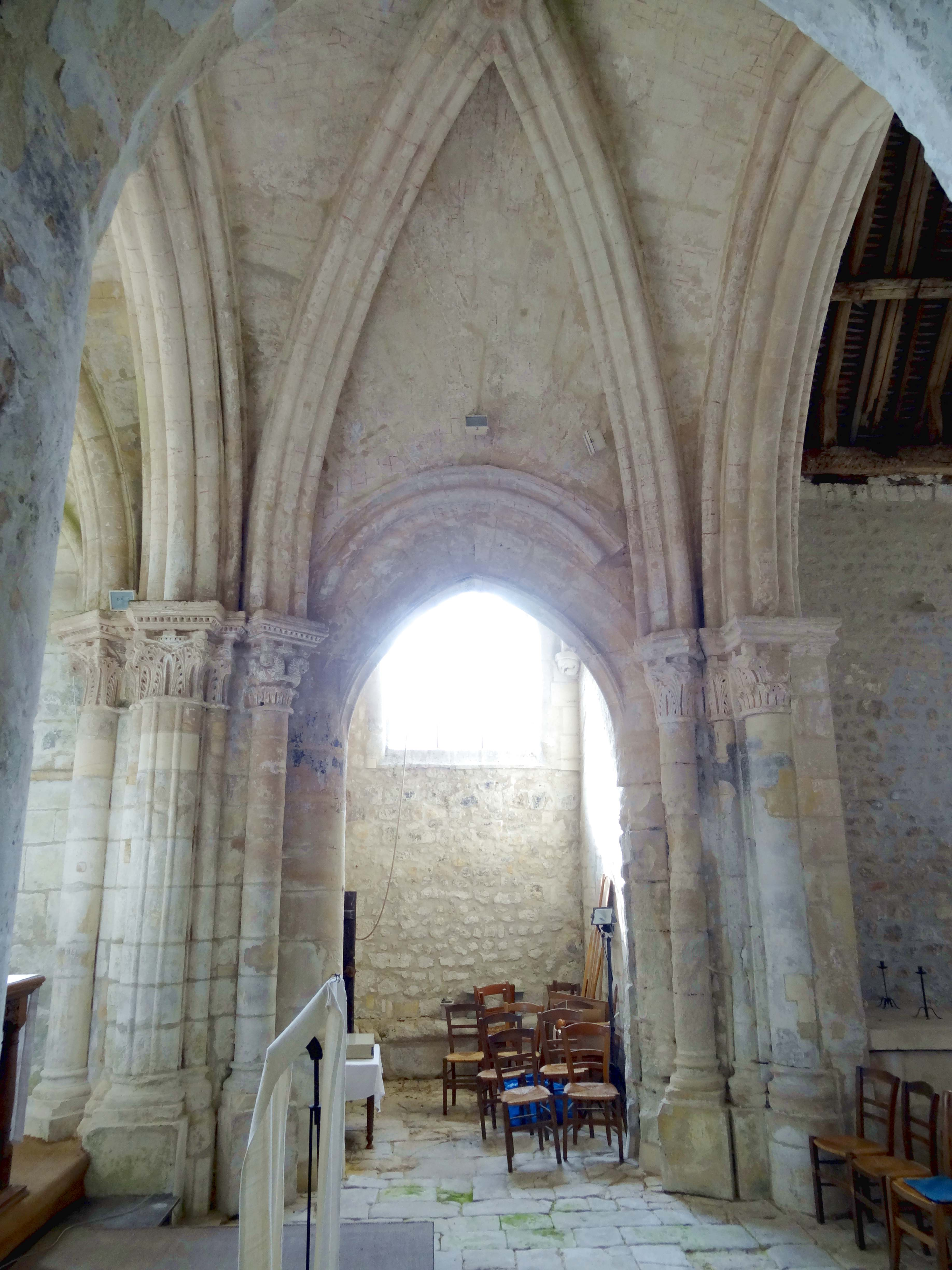 Intérieur de l'église - voir titre.